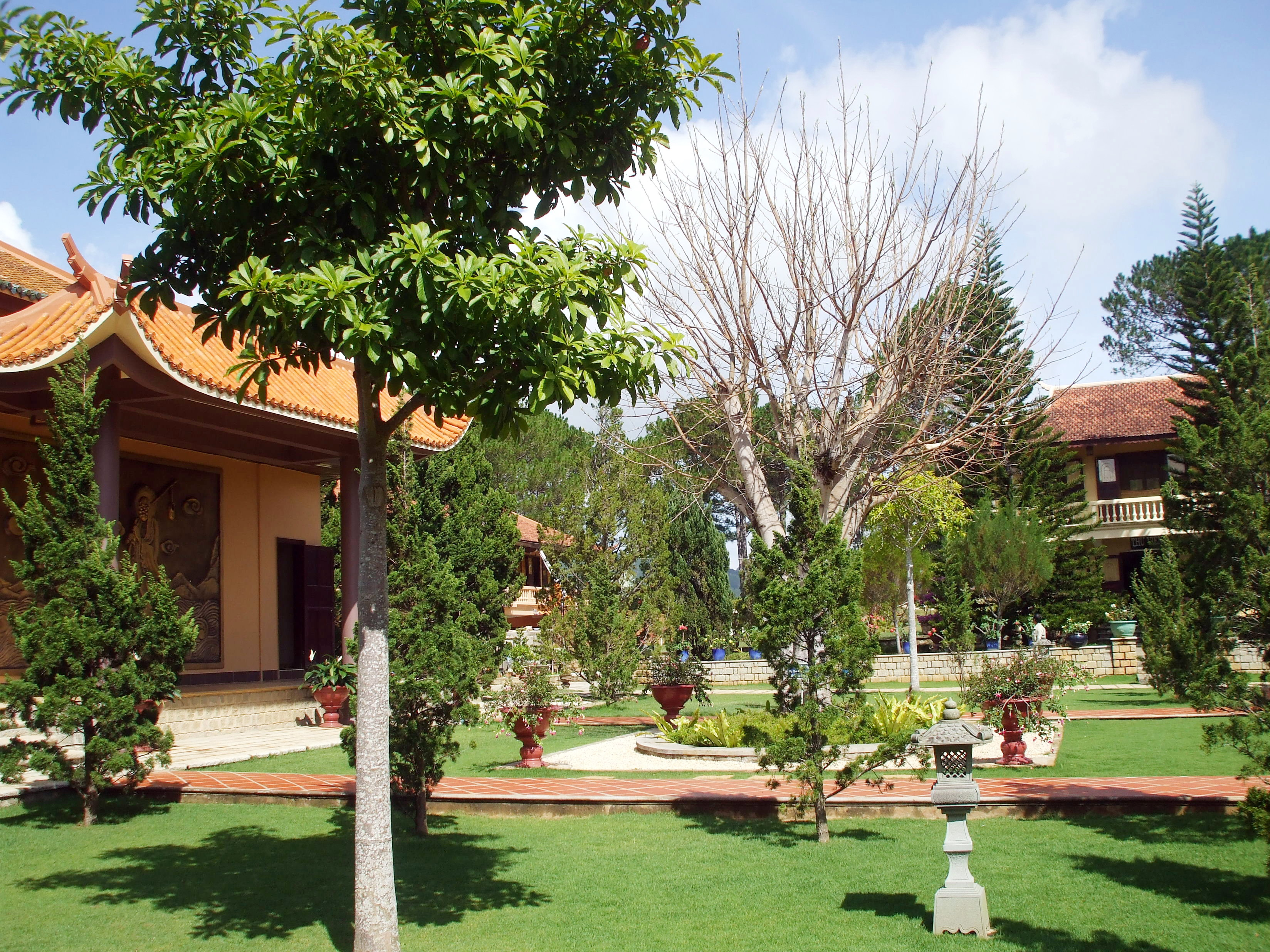 Phong cảnh ở phía sau chính điện thiền viện Trúc Lâm, Đà Lạt (Lâm Đồng, Việt Nam)